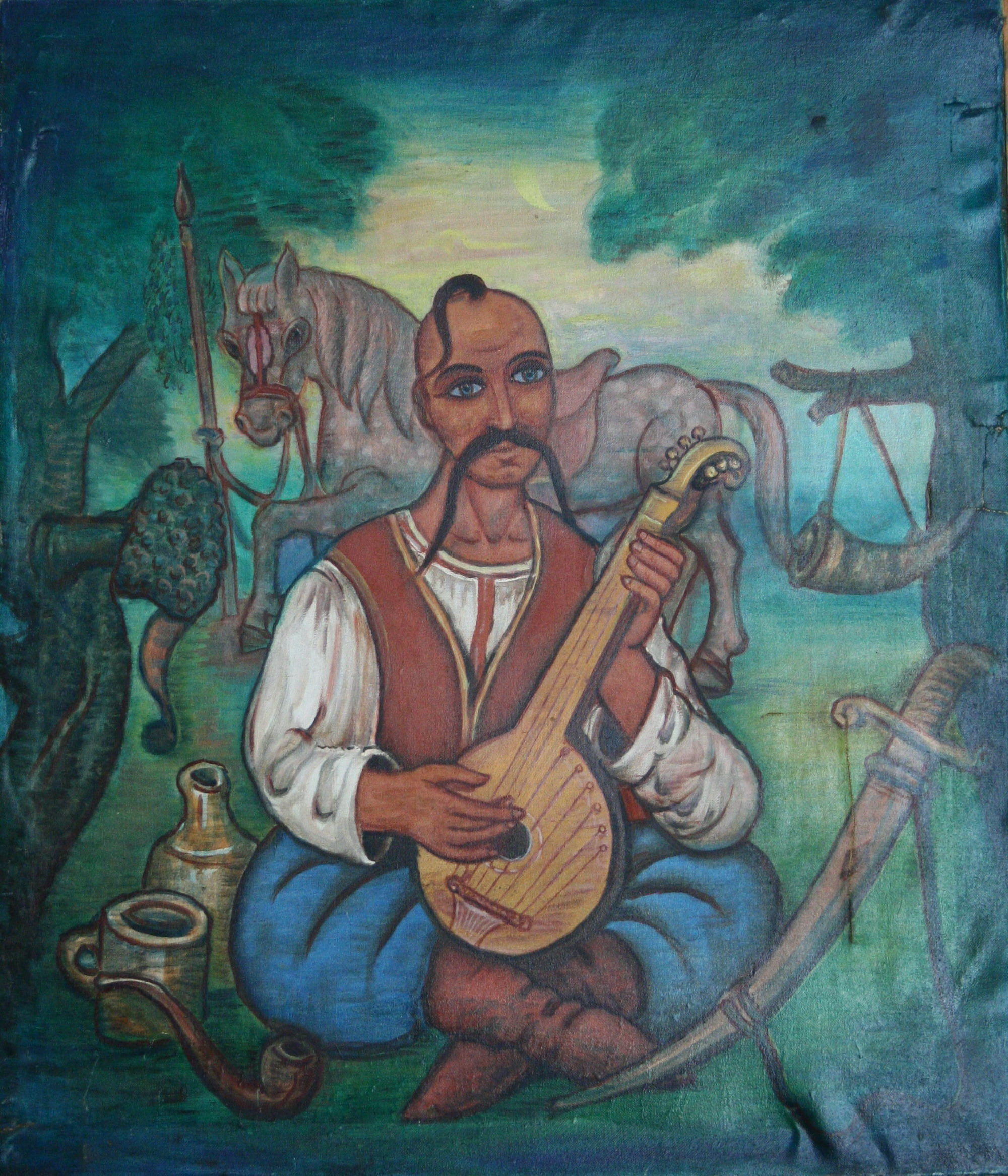 3. Козак Мамай. Олія. 1995 р., Музей козацької слави